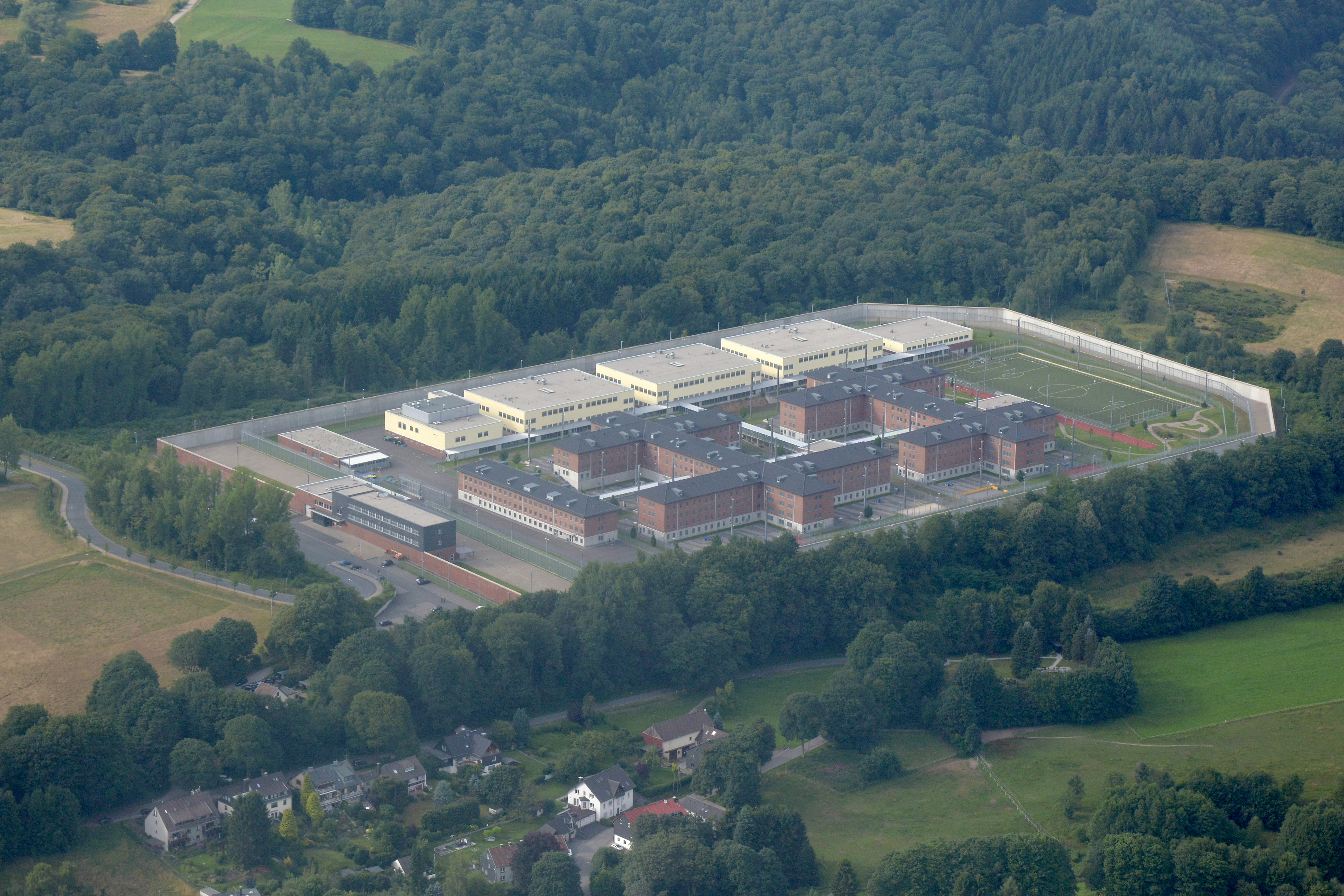 unbekanntes Objekt in Nordrhein-Westfalen